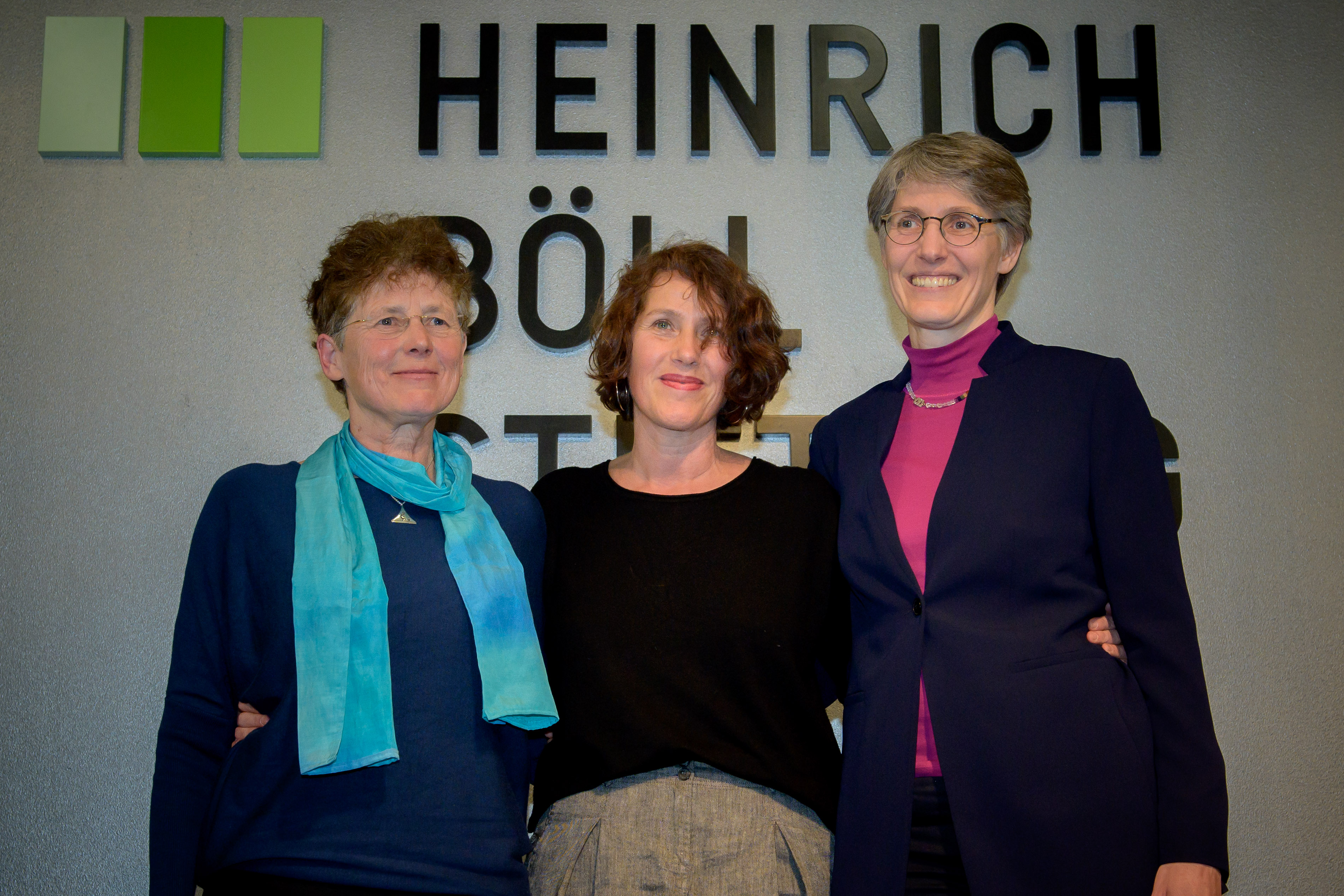 Preisträgerinnen Anne-Klein-Frauenpreis 2019: Kristina Hänel, Nora Szász, Natascha Nicklaus (Ärztinnen)Foto: Stephan Röhl